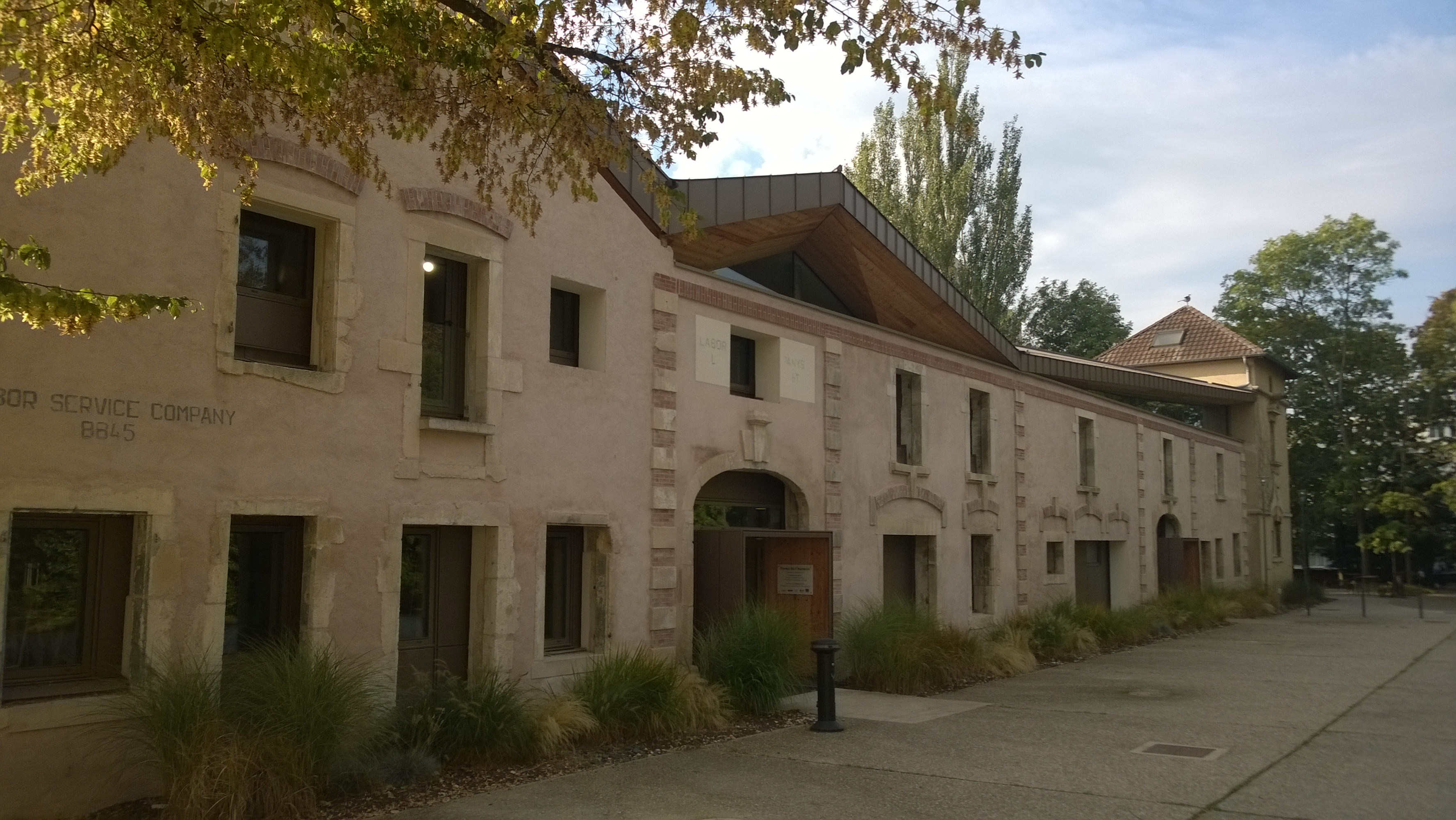 Ferme du Charmois à Vandoeuvre-lès-Nancy